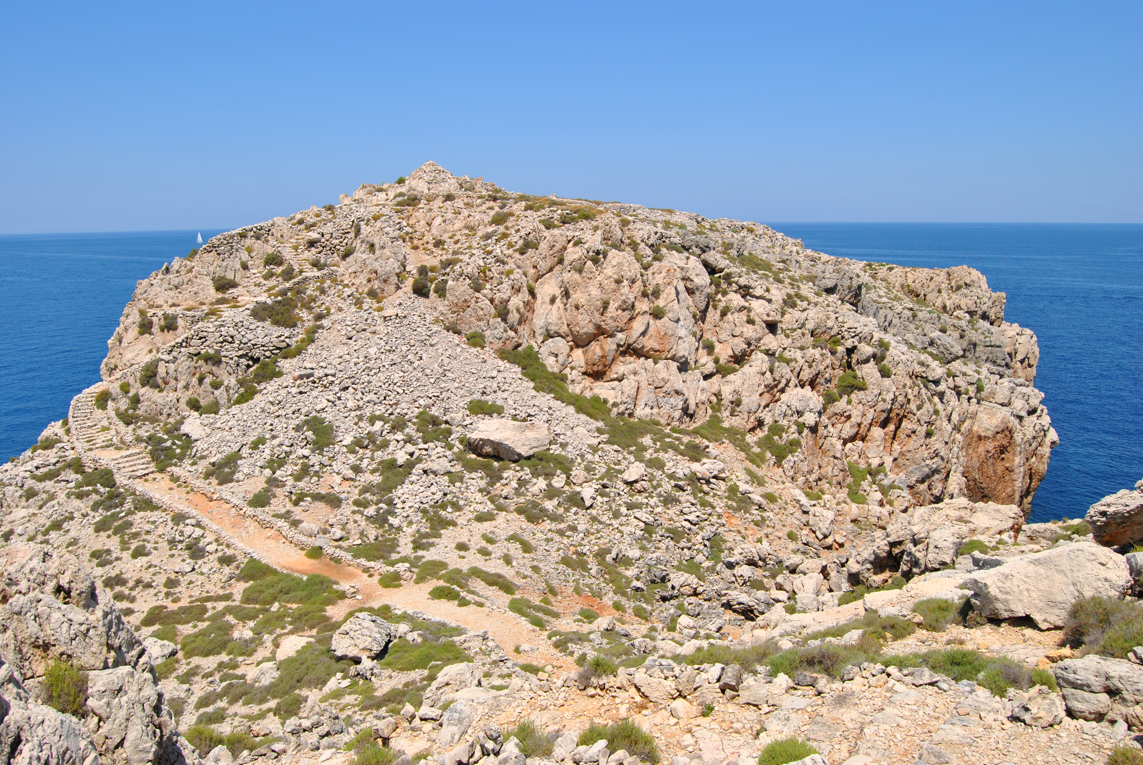 Vista general del promontori on s'ubica el poblat prehistòric de Cala Morell, as Coll de sa Cala (Menorca)